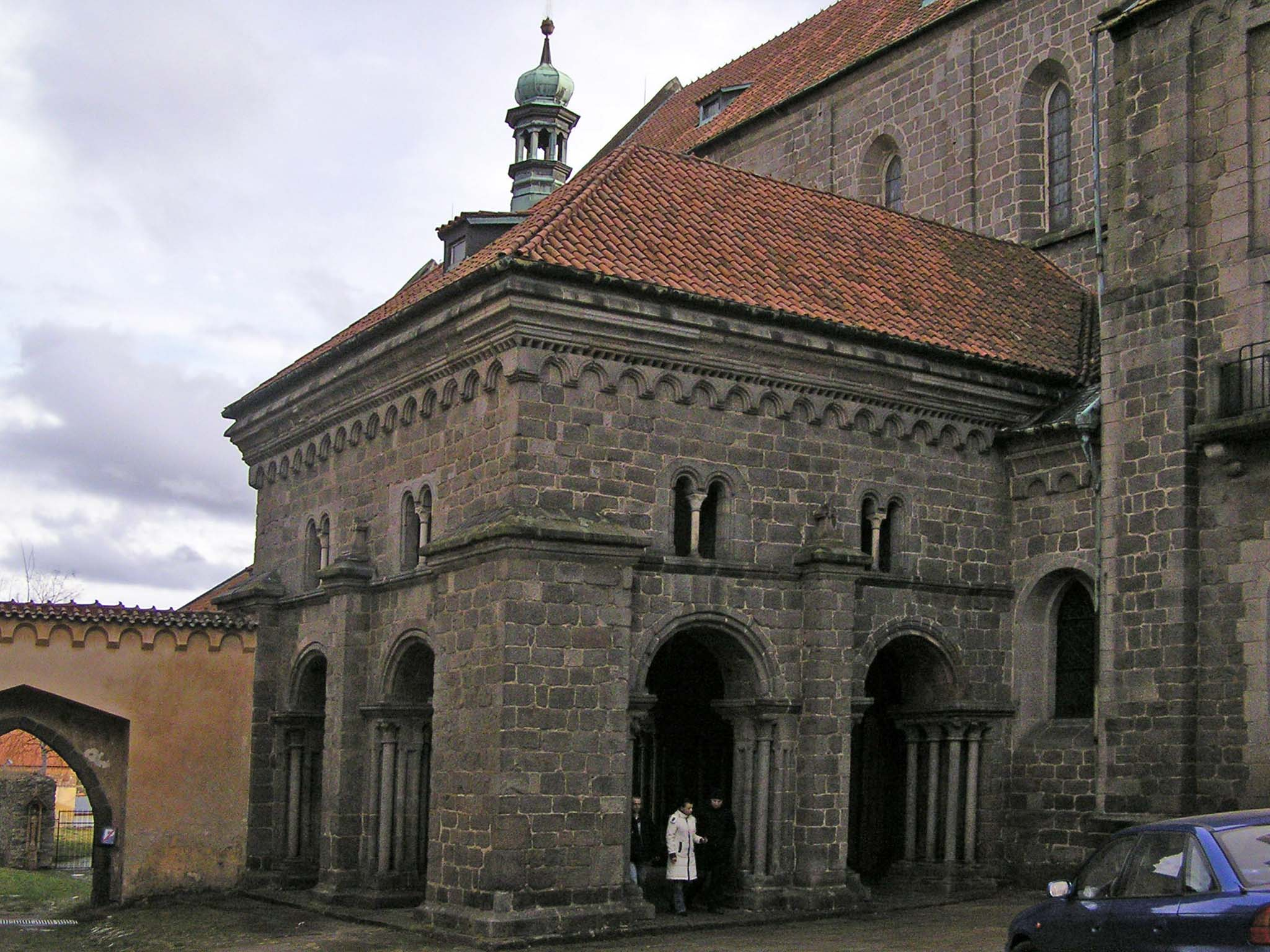 Bazilika svatého Prokopa v Třebíčí (Chrámová předsíň s portálem)